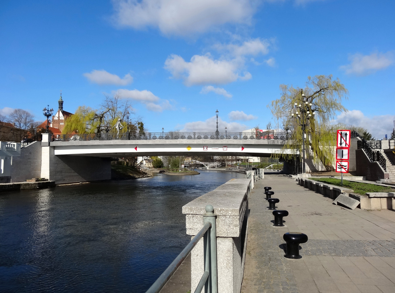 Most Staromiejski im. Jerzego Sulimy-Kamińskiego w Bydgoszczy